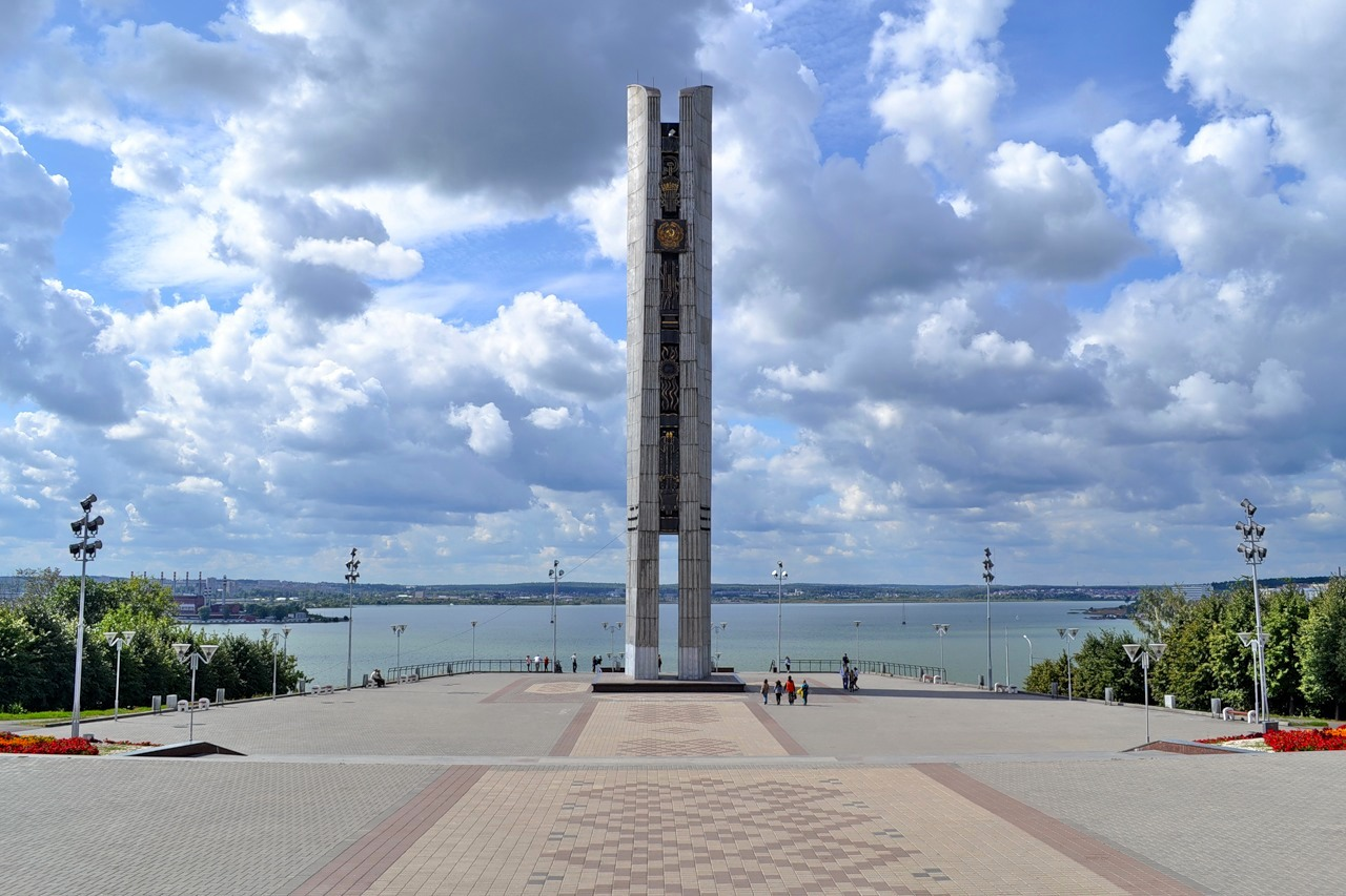 Монумент Дружбы народов, г. Ижевск